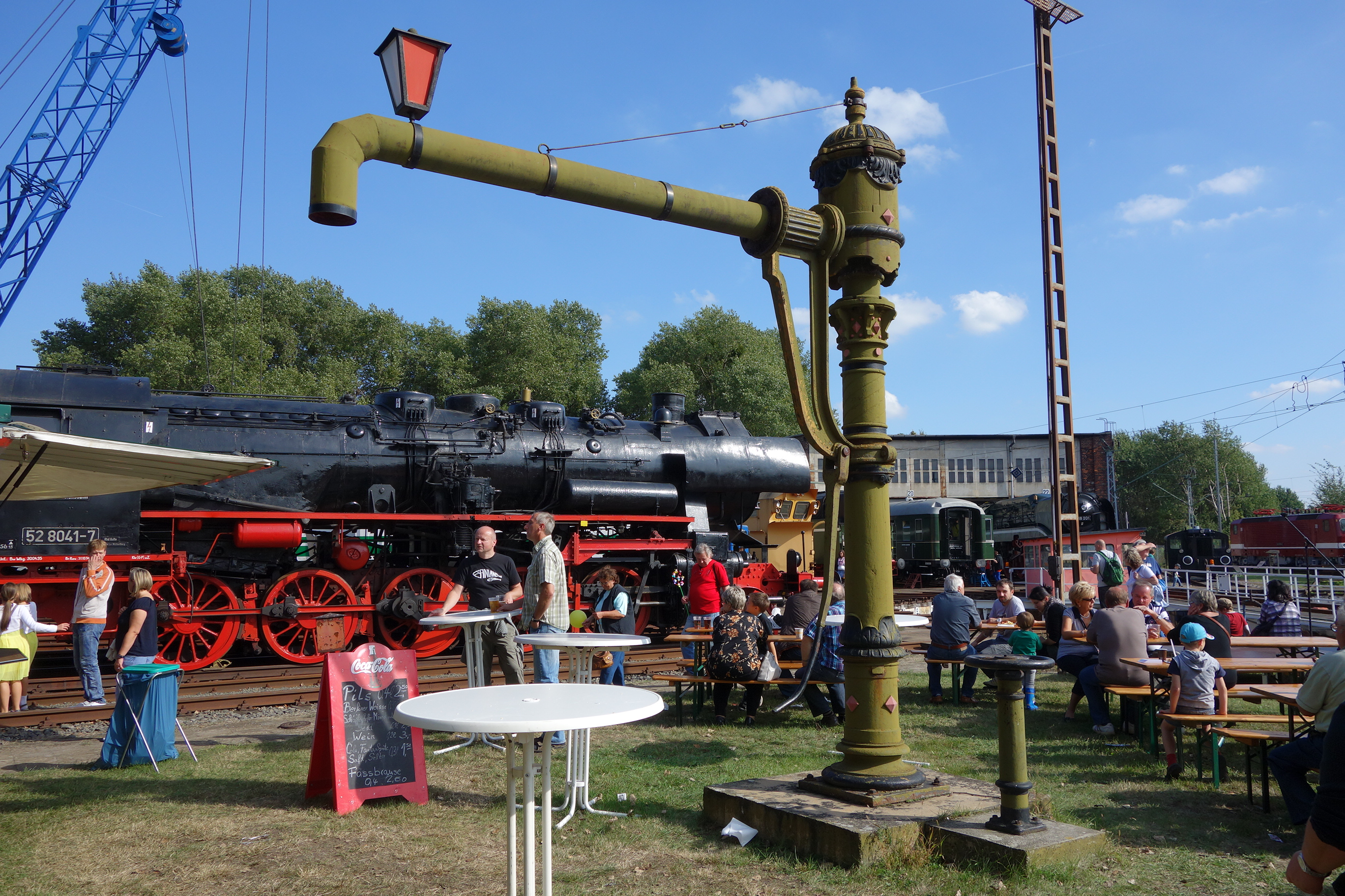 Bahnbetriebswerk Lutherstadt Wittenberg, Wasserkran.